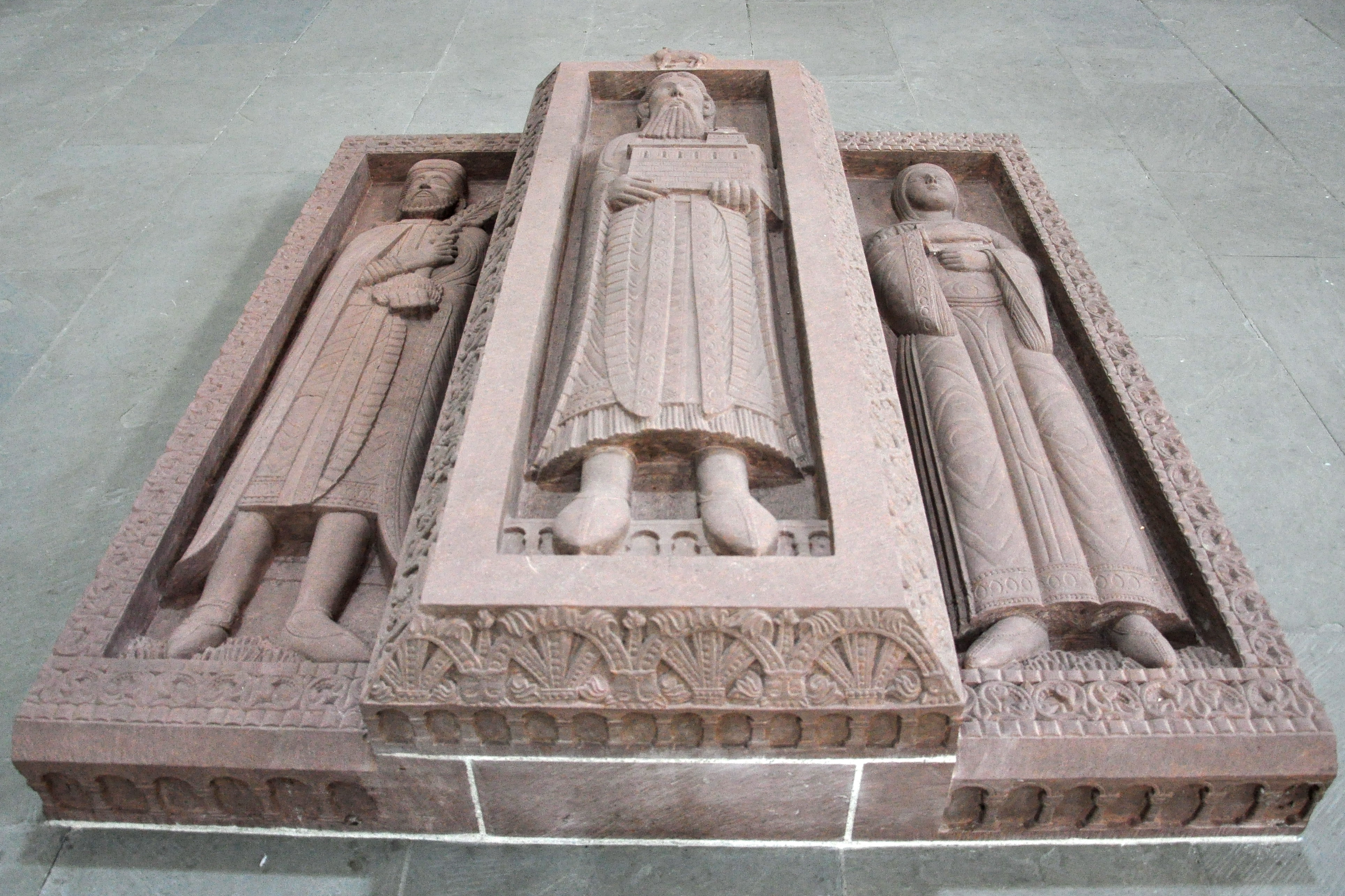 Kloster Allerheiligen in Schaffhausen (Switzerland)Rekonstruktion der Grablege der Nellenburger: In der Mitte Graf Eberhard (+ 1078/79) als Gründer und Stifter des Klosters mit dem Kirchenmodell im Arm, nördlich seine Gemahlin, Gräfin Ita (+ nach 1100), Gründerin des Doppelklosters St. Agens, und südlich ihr Sohn Burkhard (* 1101/02) mit Bäumchen oder Halm mit Wurzelballen (festuca) in den Händen, welches die Schenkung symbolisiert.